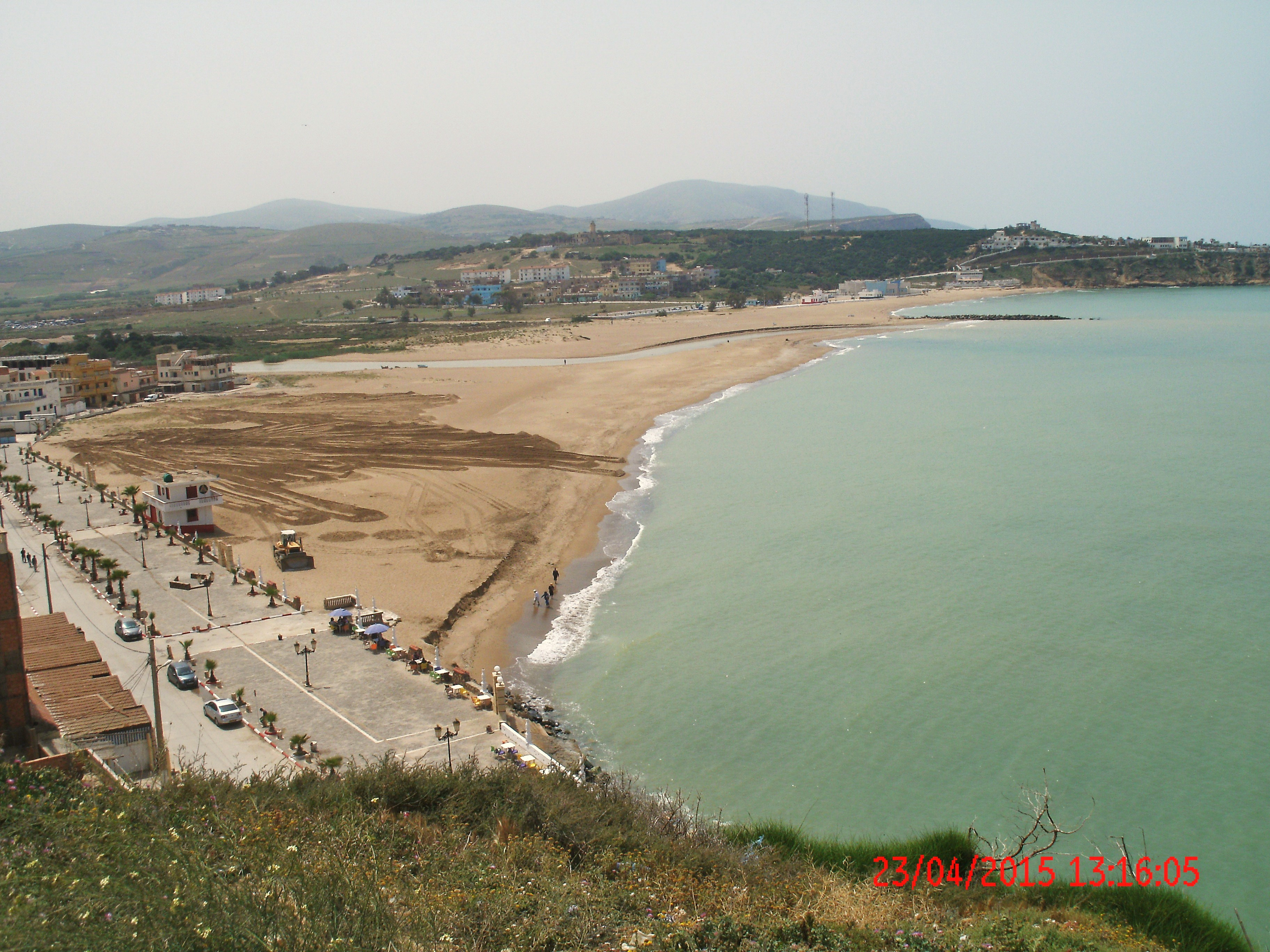 Embouchure de la Tafna à Rachgoun